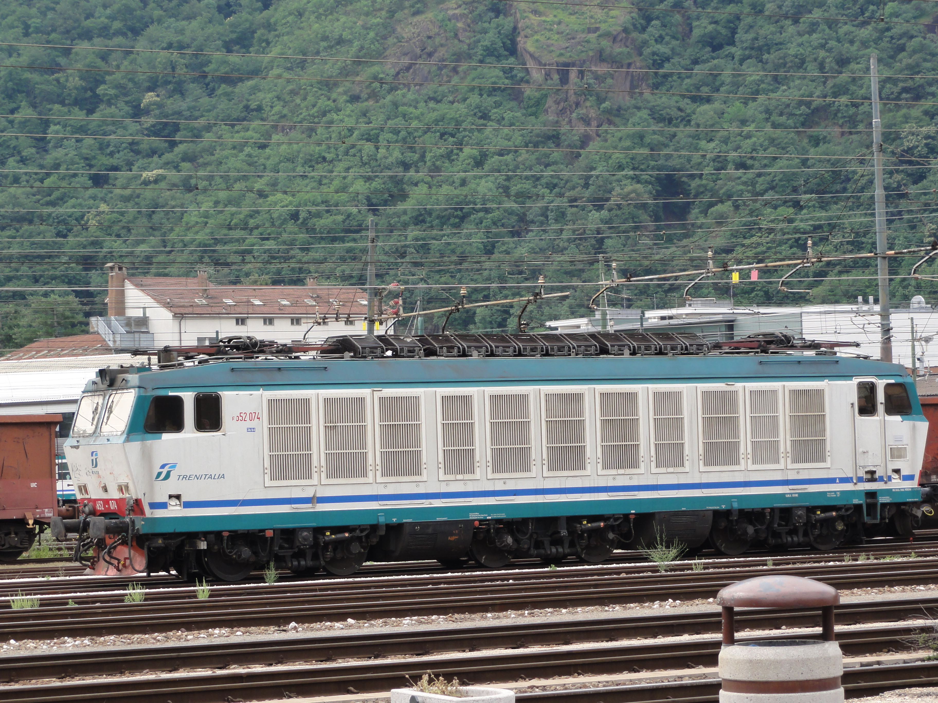 FS gruppo E.652 Info EXIF data regarding date and time may be inaccurate.